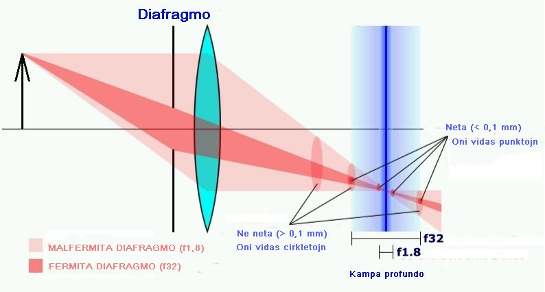 Transprenita el la nederlanda vikio, mem adaptita al Esperanto, sub GNU-licenco